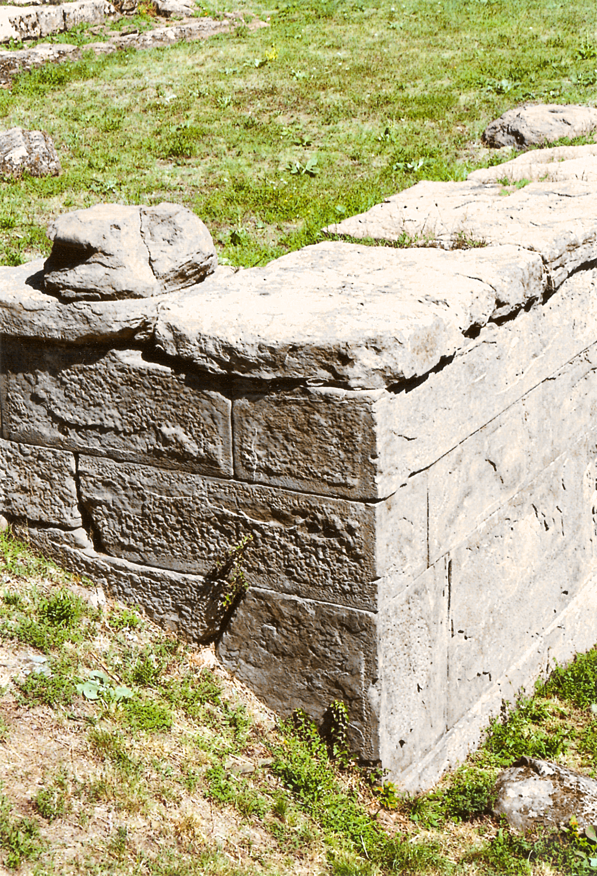 Fiesole (Toskana, Italien) - Archäologische Zone - etruskisch-römischer Tempel. Im Bild ist eine der Ecken des römischen Tempelpodiums mit Rustikamauerwerk und Randschlag zu sehen.